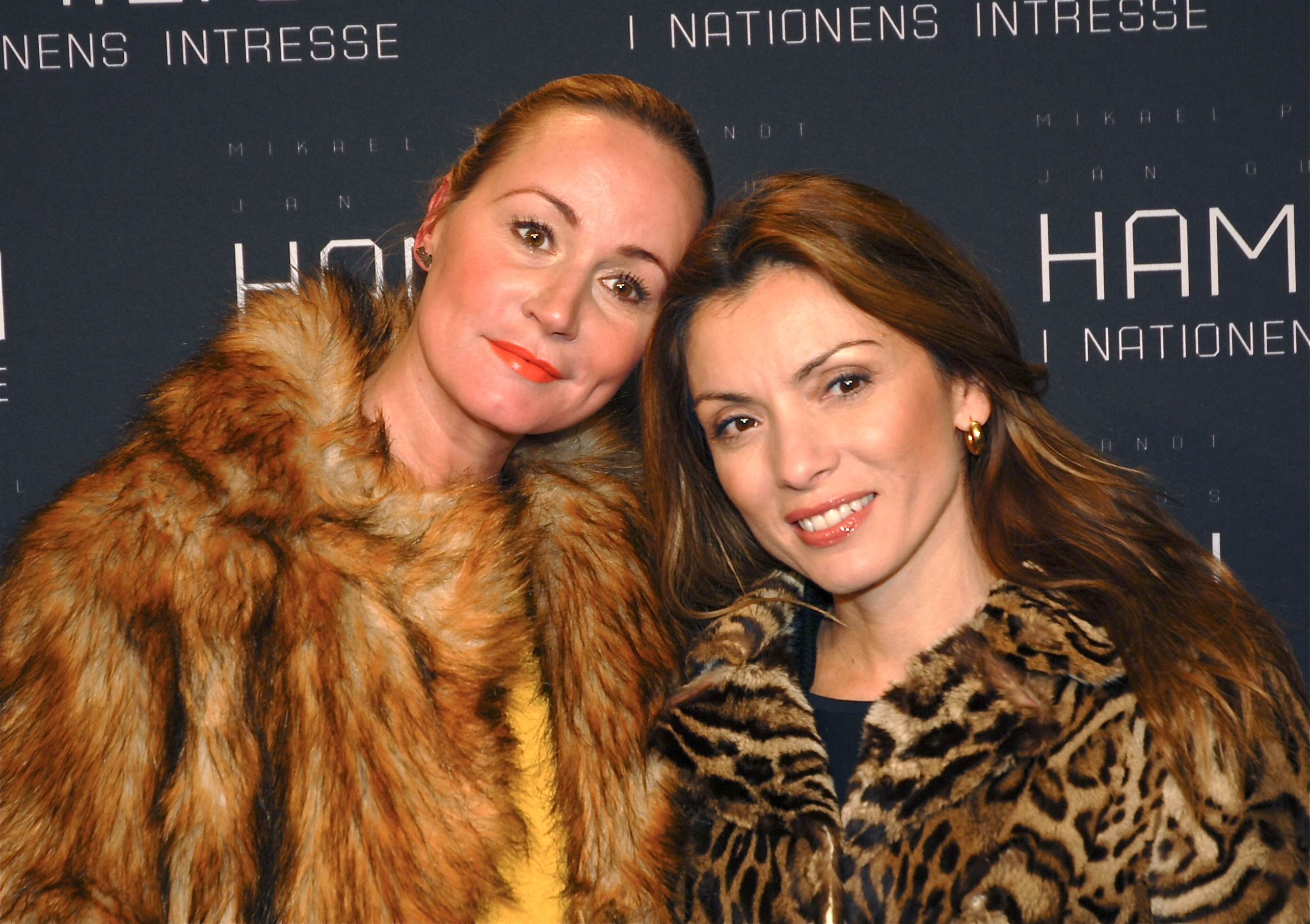 Marika Gougaud och Alexandra Pascalidou på galapremiären av Hamilton - I nationens intresse, på biograf Sergel i Stockholm den 9 januari 2012.